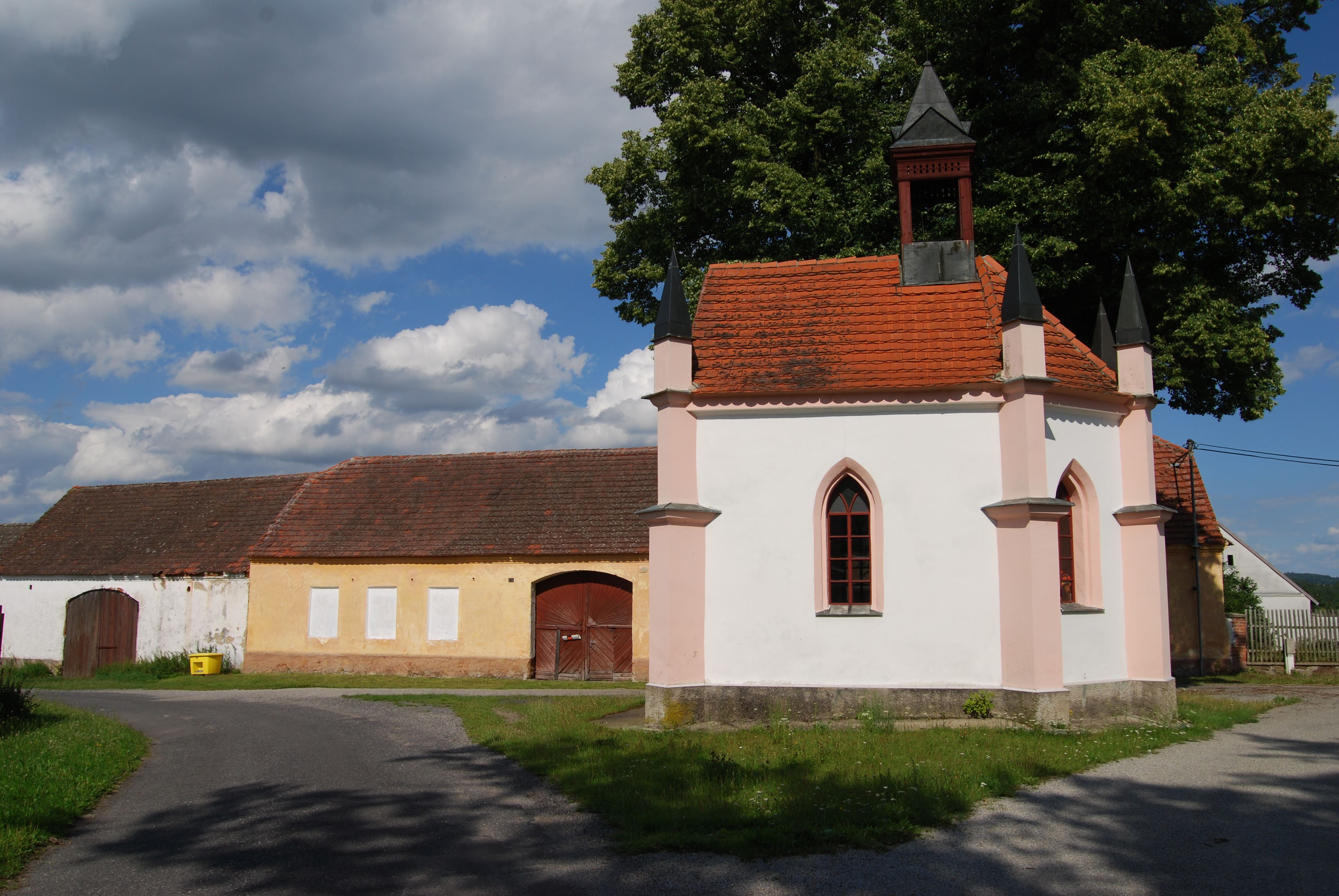 Pohled na část obce a kapli. Kaple v obci na návsi je zasvěcená svatému Josefovi. Temešvár (okres Písek). Česká republika.